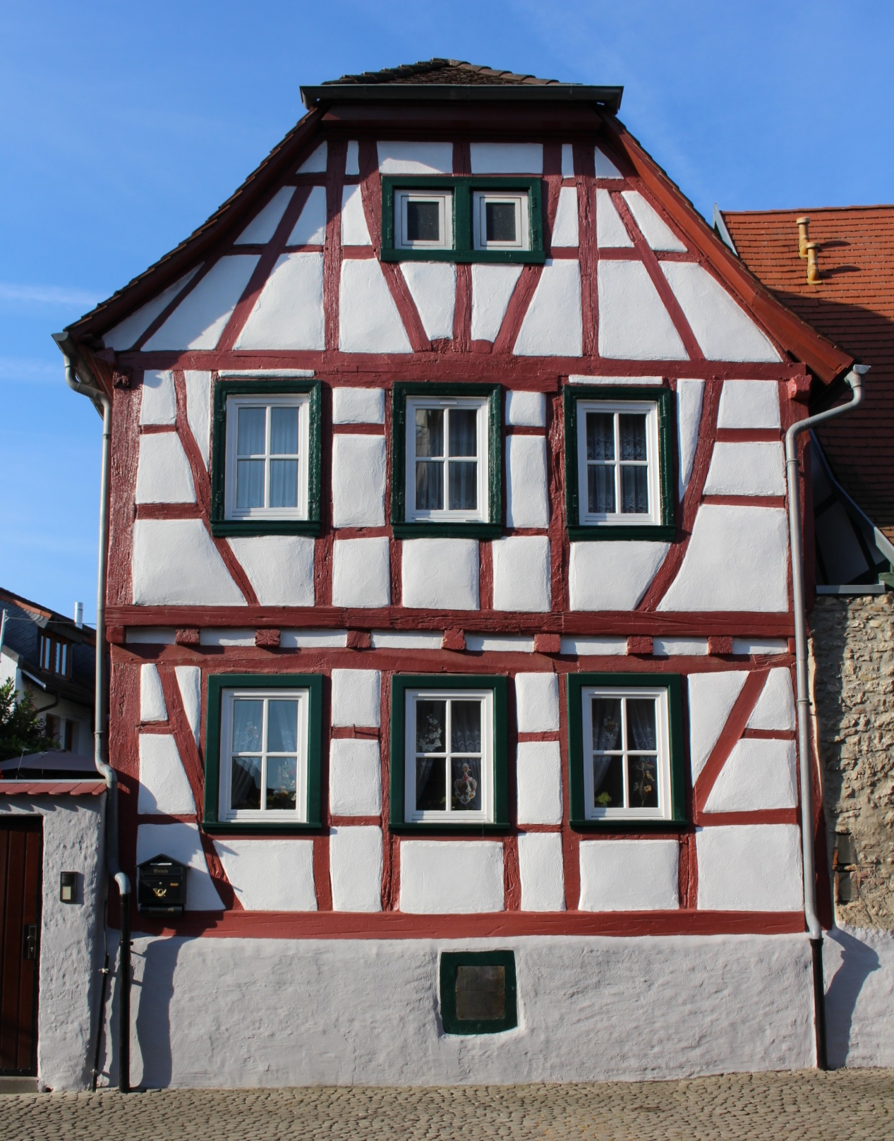 Fachwerkhaus, Pfarrer-Münch-Straße 5, 65439 Flörsheim